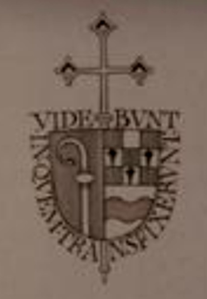 Wappen Bischof Karl Braun, Bischof von Eichstätt von 1984 bis 1995.